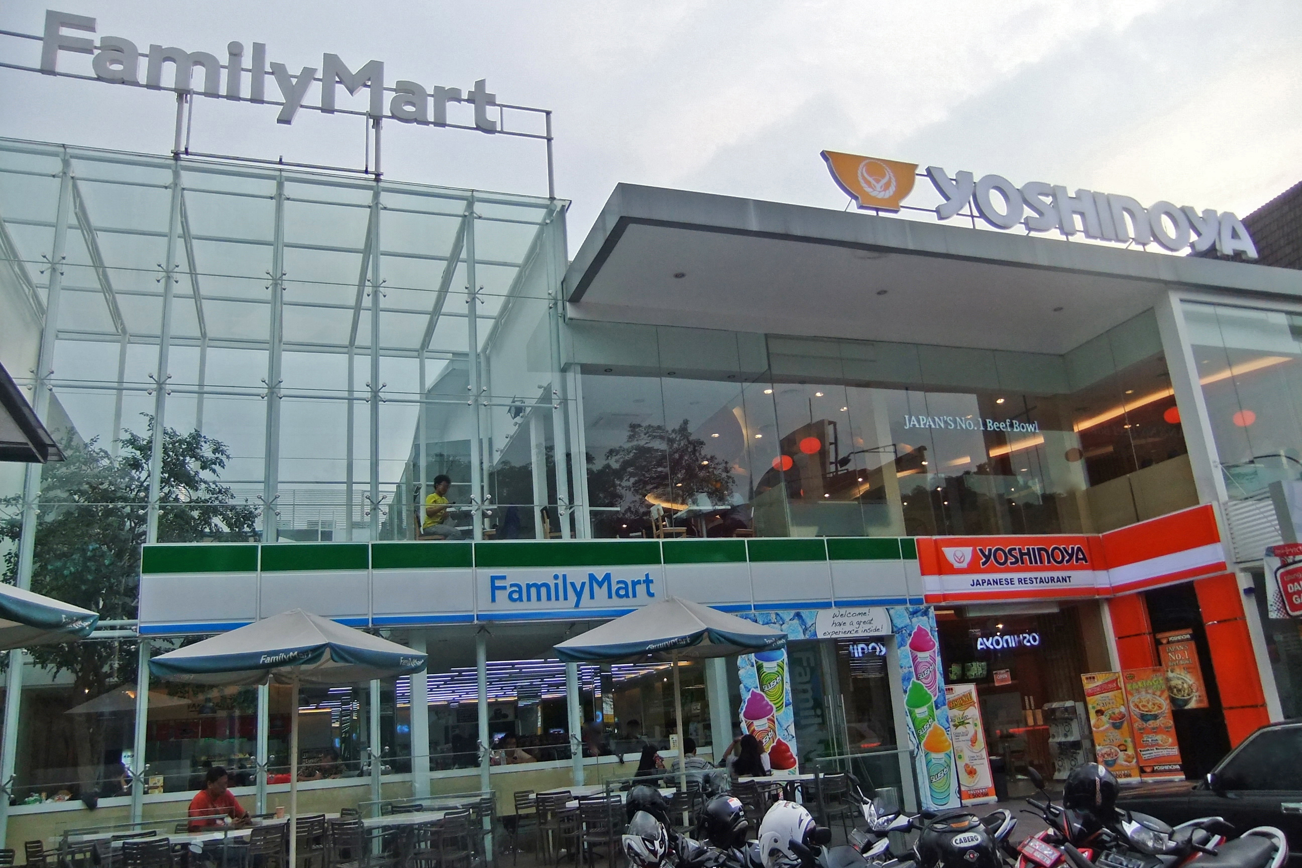 南ジャカルタのジャランブルンガンにある吉野家とファミリーマートBahasa Indonesia: Yoshinoya dan FamilyMart di Jalan Bulungan, Jakarta Selatan